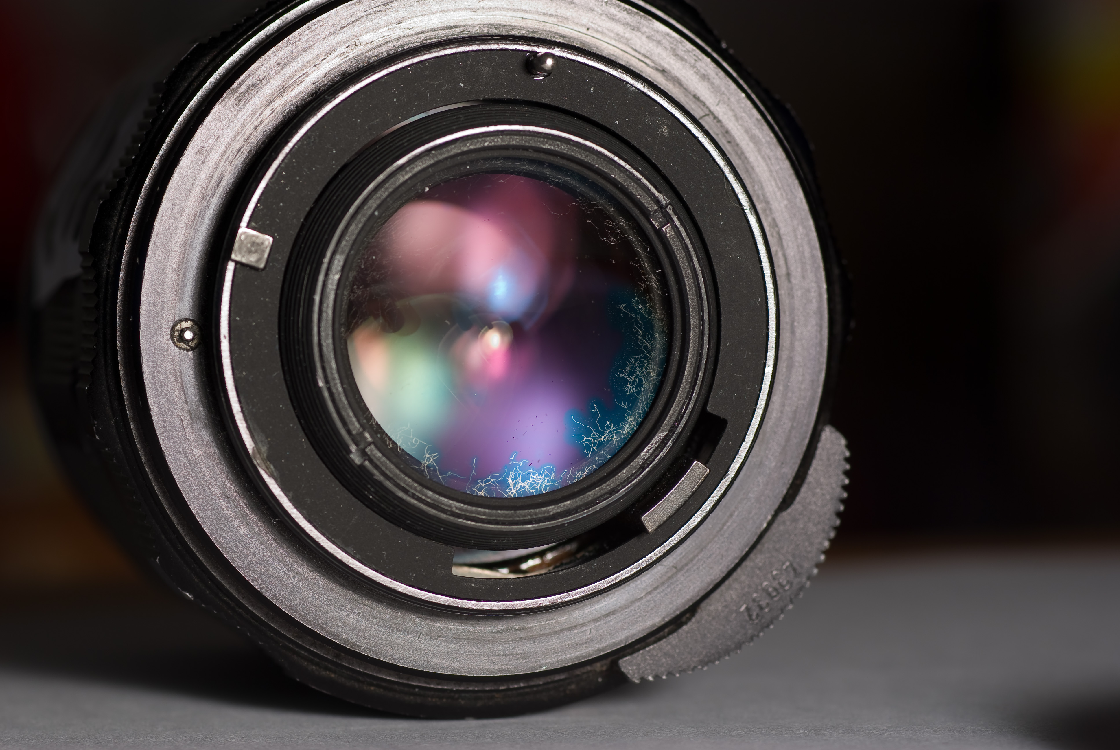 Kleinbildkamera-Objektiv mit Fungus (Glaspilz) an der Rücklinse